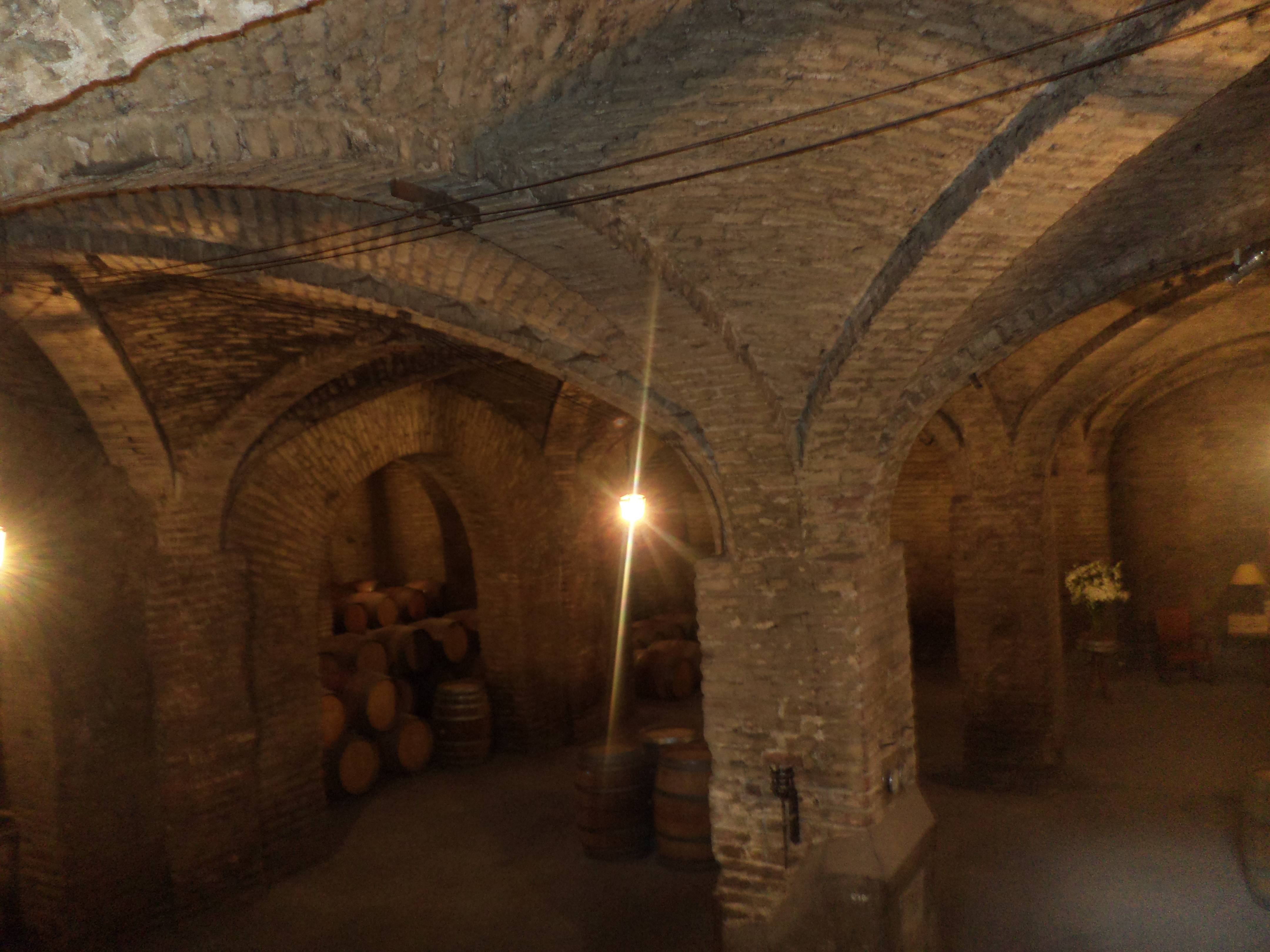 Casa del enólogo y bodegas de la viña Santa Carolina, en Santiago de Chile. Declaradas Monumento Histórico Nacional en 1973. This is a photo of a national monument in Chile: 1252